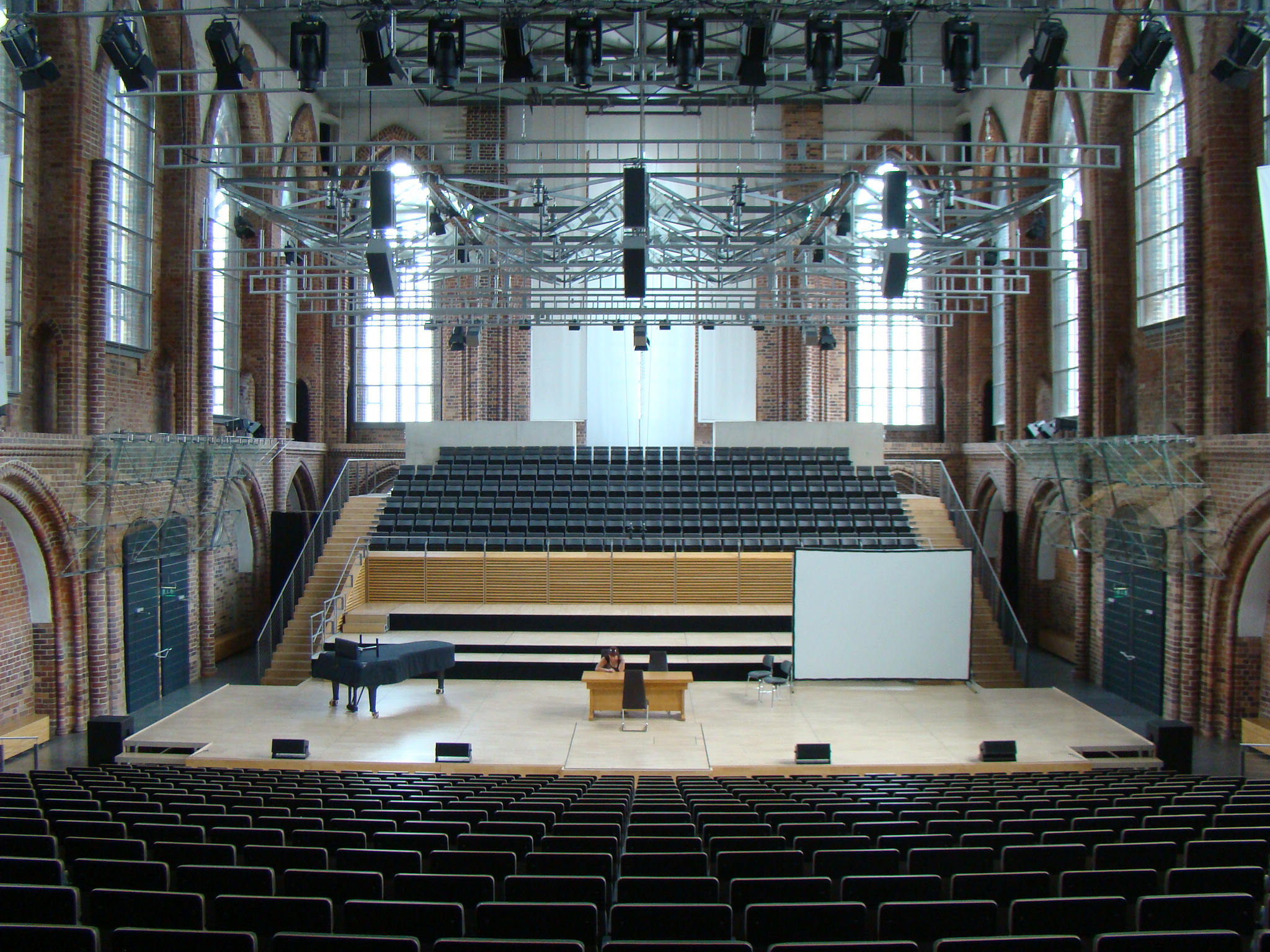 Konzertkirche (ehem. Marienkirche) in Neubrandenburg